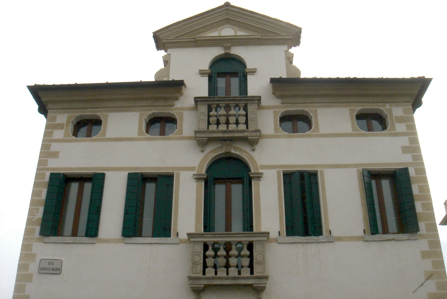 Conegliano (Treviso): Villa Bortolon (XVIII secolo) in via Manin, particolare della facciata.